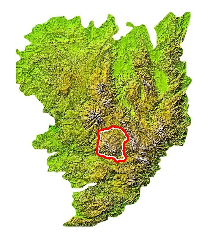 Situation de l'Aubrac sans la Viadenne sur la carte du Massif central